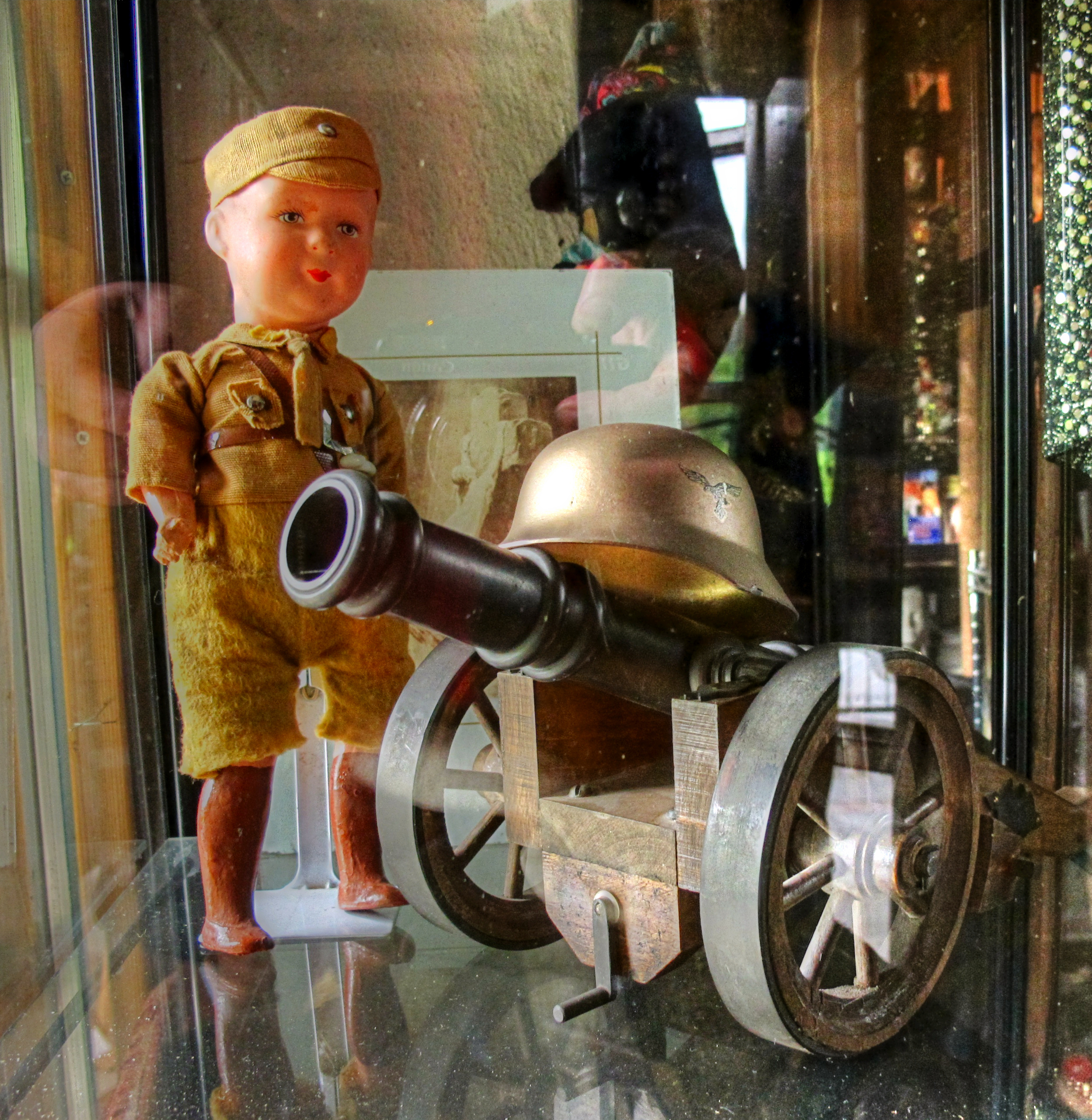 Hitlerjugend Spielfigur aus dem Puppenmuseum in Rieden am Forggensee, ca. 1935